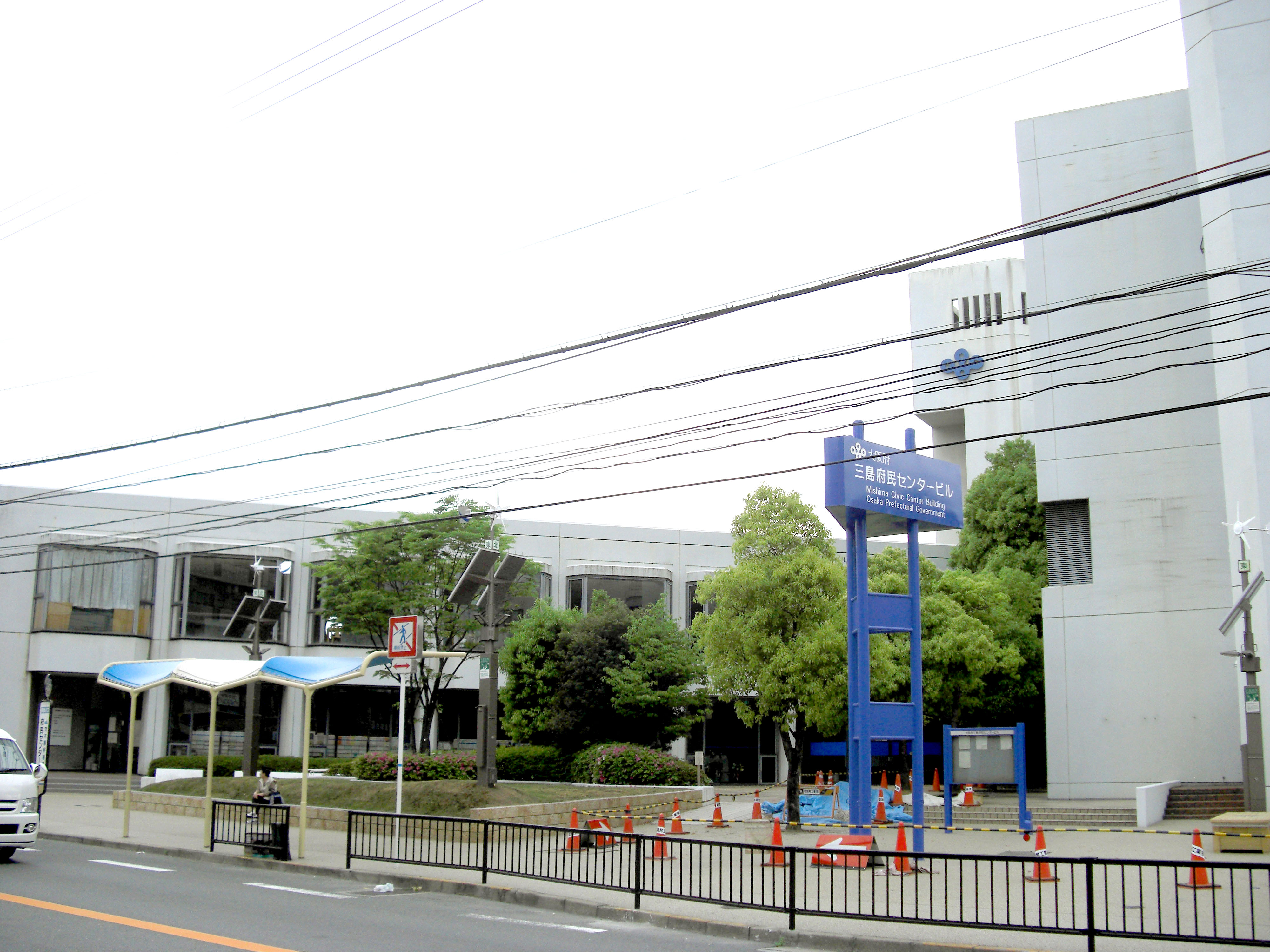 Mishima Civic Center,Nakahozumi Ibaraki-City Osaka Japan.